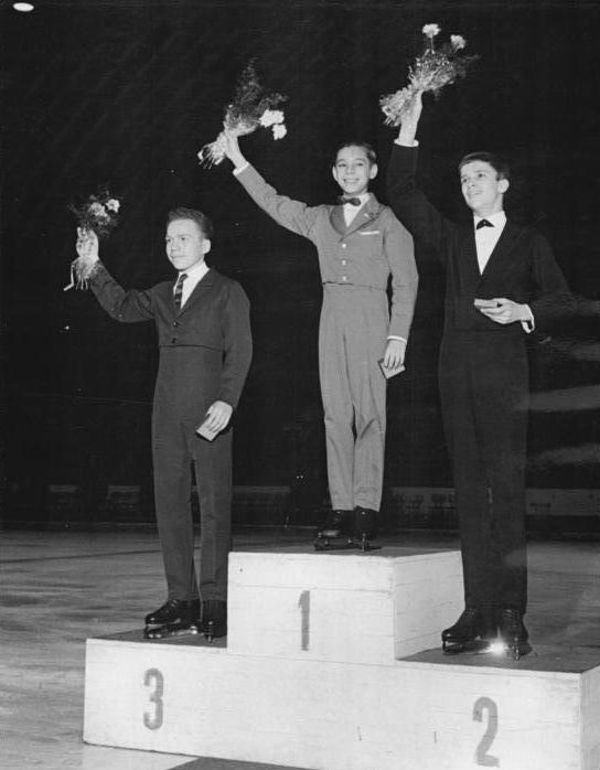 Günter Zöller, Nepela, Kurembin Zentralbild CTK 5.12.1964 Einen hervorragenden zweiten Platz belegte der DDR-Sportler Günter Zöller (auf unserem Foto rechts) bei dem internationalen Eiskunstlaufwettbewerb um den "Goldenen Schlittschuh" in Prag. Den ersten Platz belegte Nepela (CSSR) und auf Platz drei kam der sowjetische Sportler Kurembin. Original zu Telefoto C1205-07-1N